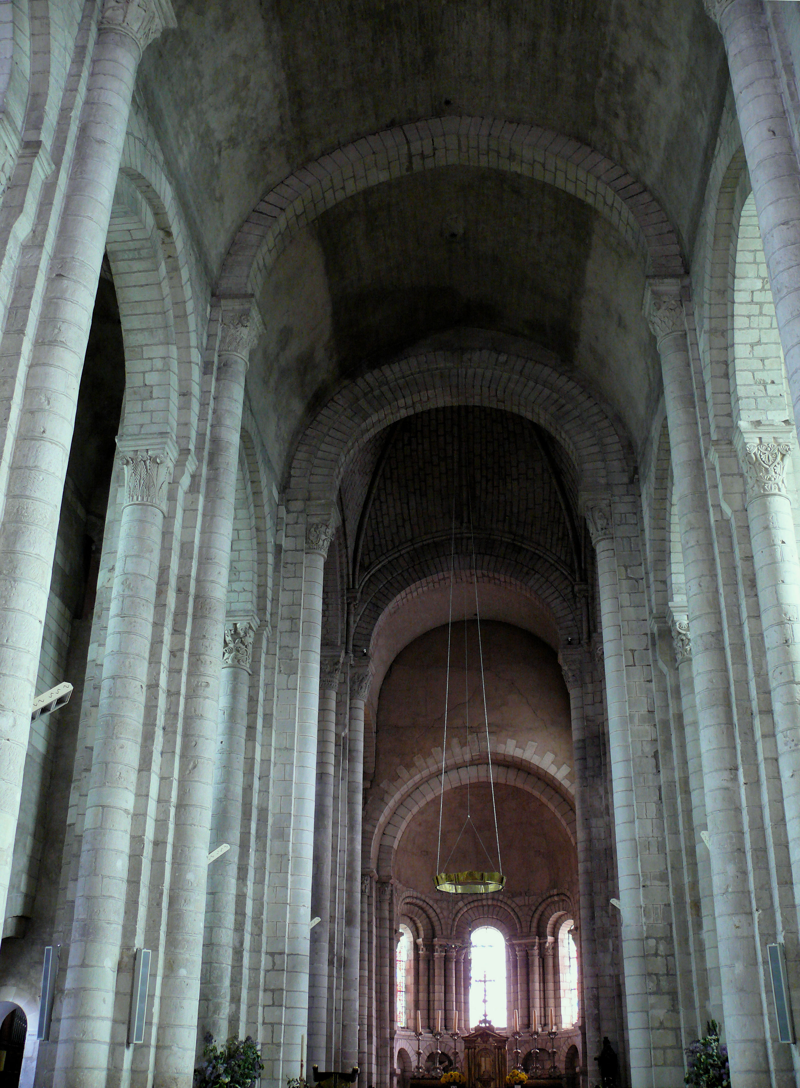 Châtillon-sur-Indre - Eglise Notre-Dame - Nef centrale